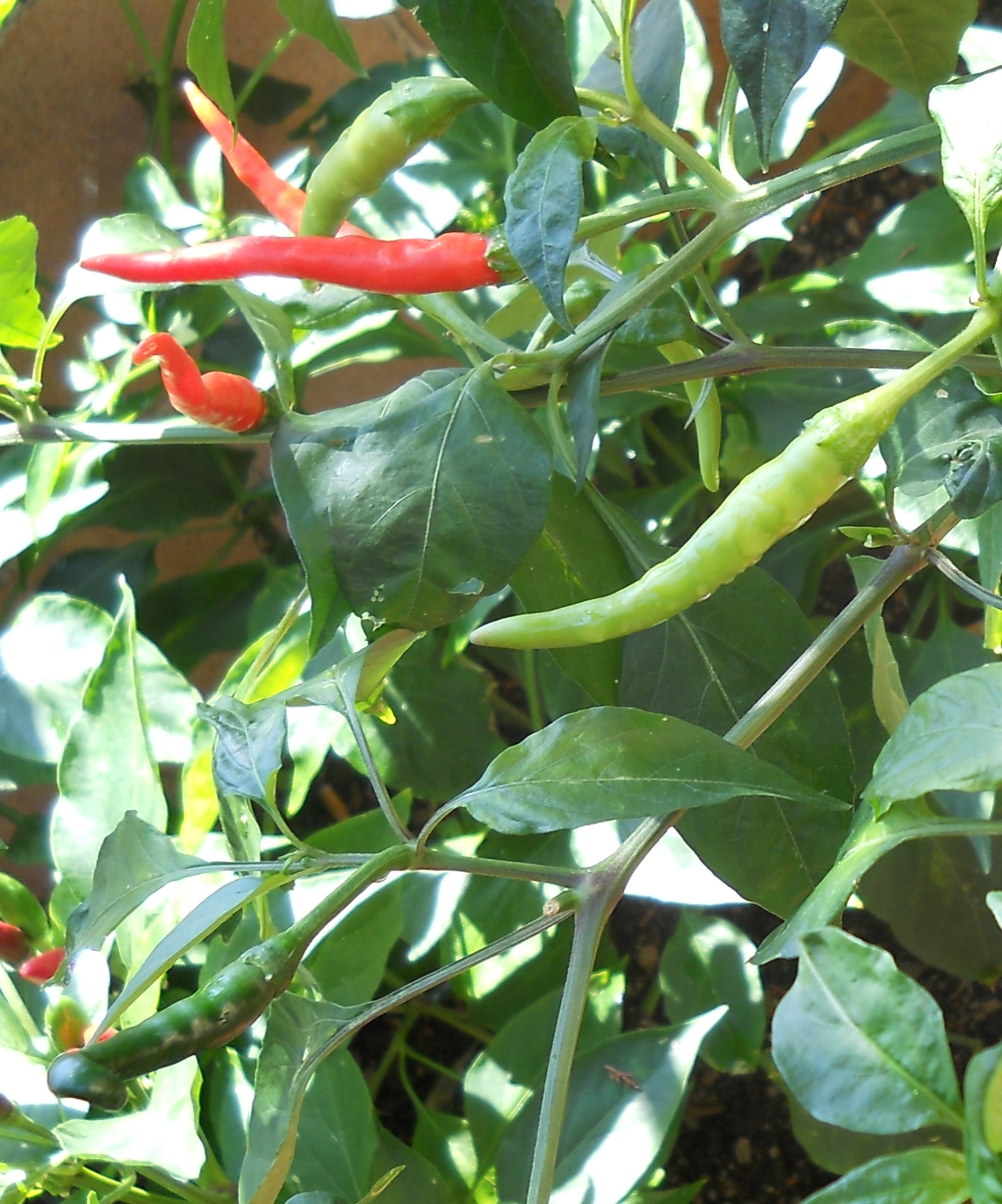 Thai pepper (Thai dragon) chiari e scuri acerbi e maturi